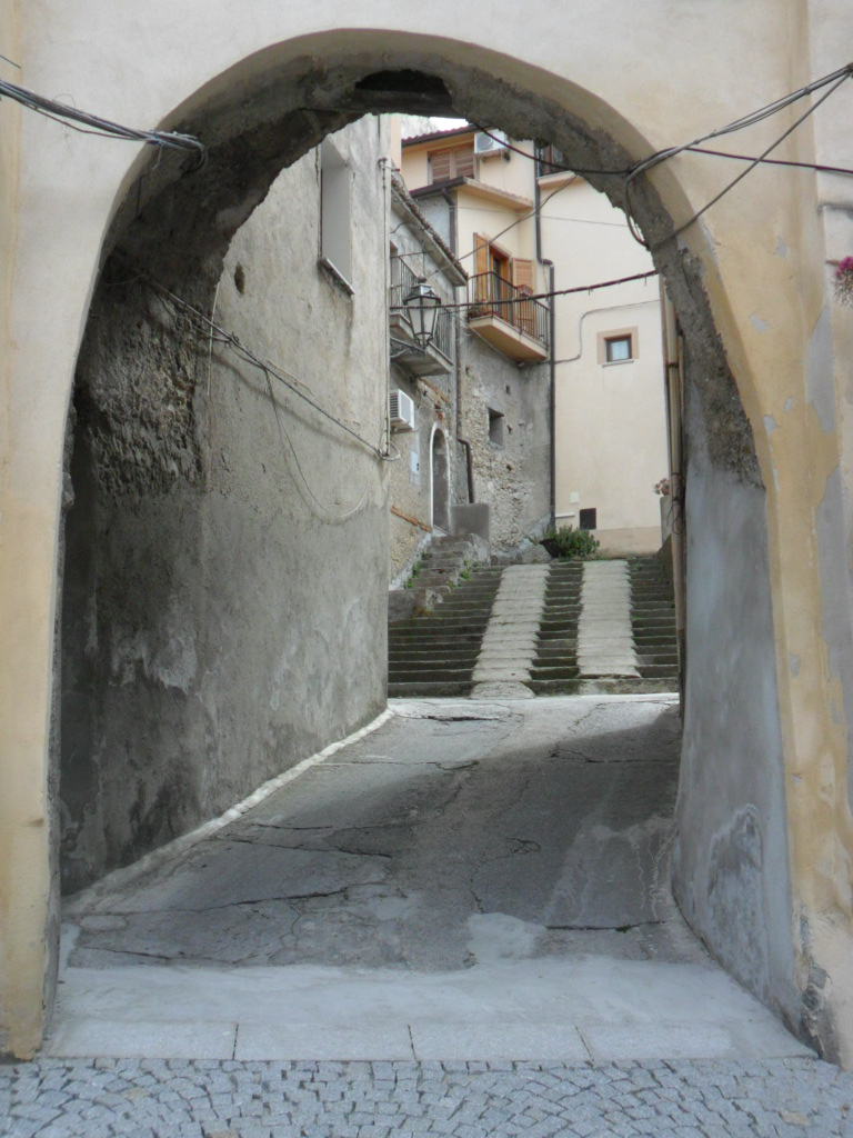 Gioiosa Jonica Porta Falsa